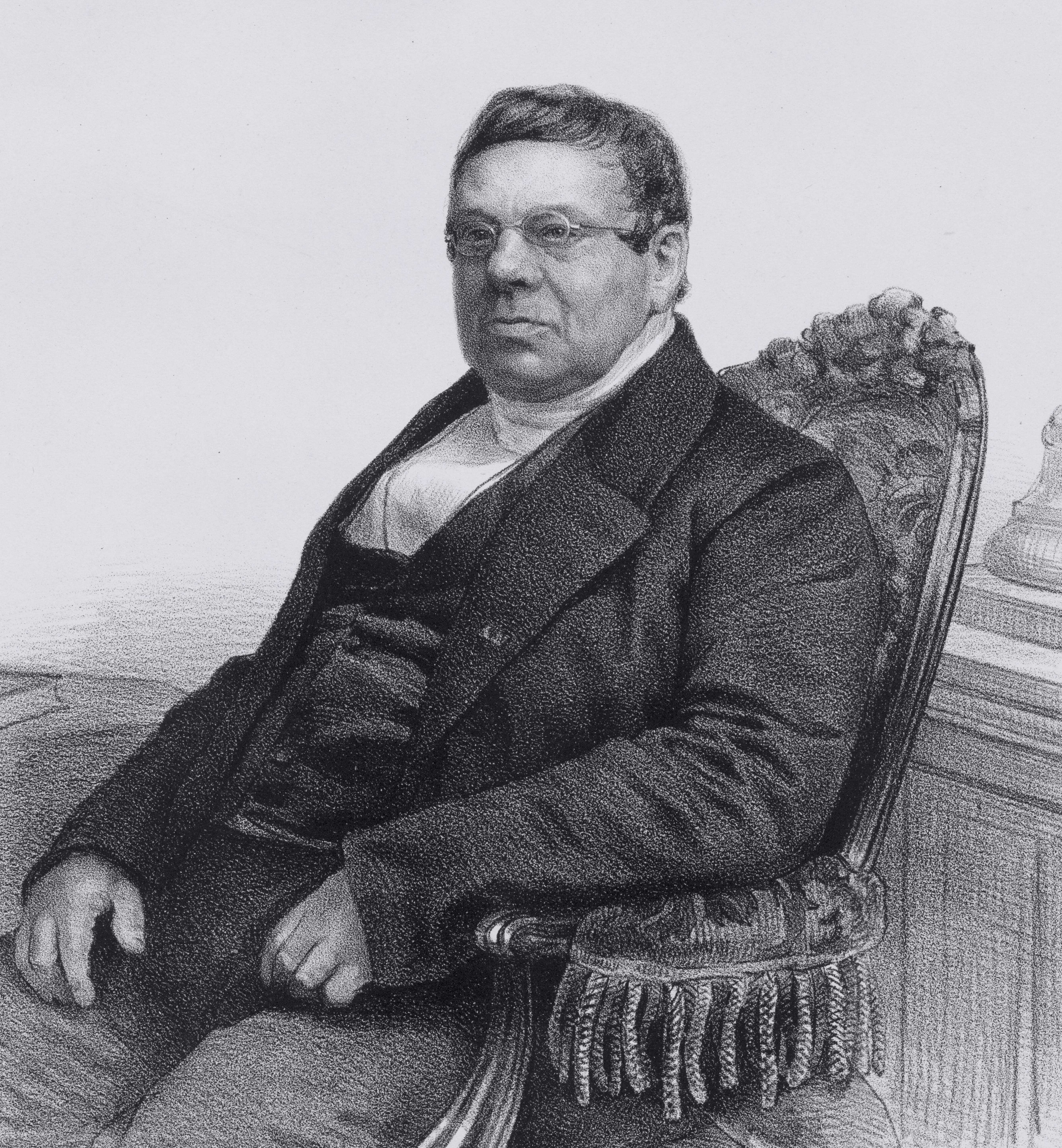 Portret van Louis Caspar Luzac (1786-1861)